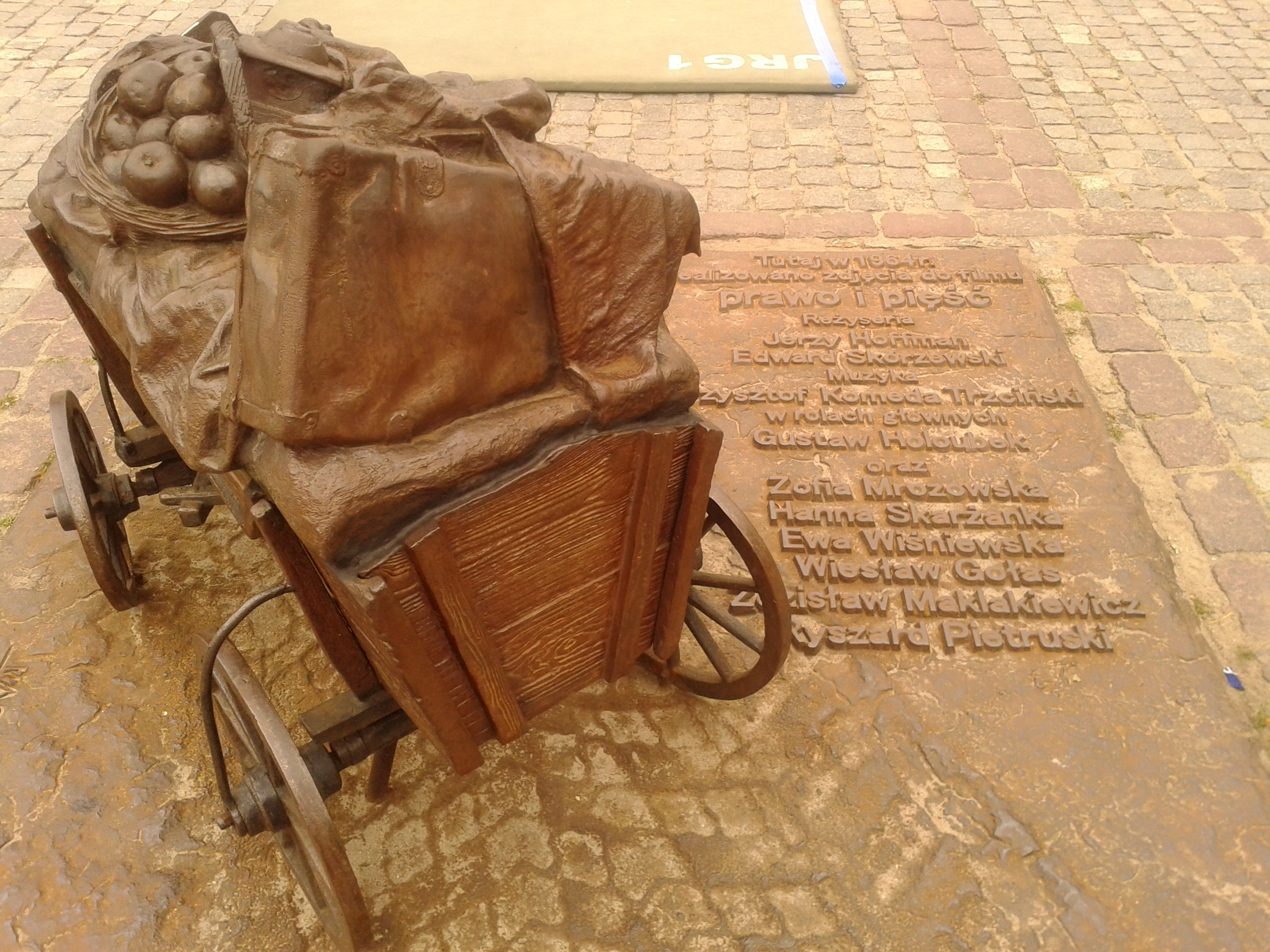 Rzeźba wozu z dobytkiem upamiętniająca film Prawo i pięść - Toruń na Rynku Nowomiejskim inskrypcja: Tutaj w 1964 roku/realizowano zdjęcia do filmu/Prawo i pięść/Reżyseria/Jerzy Hoffman/Edward Skórzewski/Muzyka/Krzysztof Komeda Trzciński/w rolach głównych/Gustaqw Holoubek/oraz/Zofia Mrozowska/Hanna Skarżanka/Ewa Wiśniewska/Wiesław Gołas/Zdzisław Maklakiewicz/Ryszard Pietruski